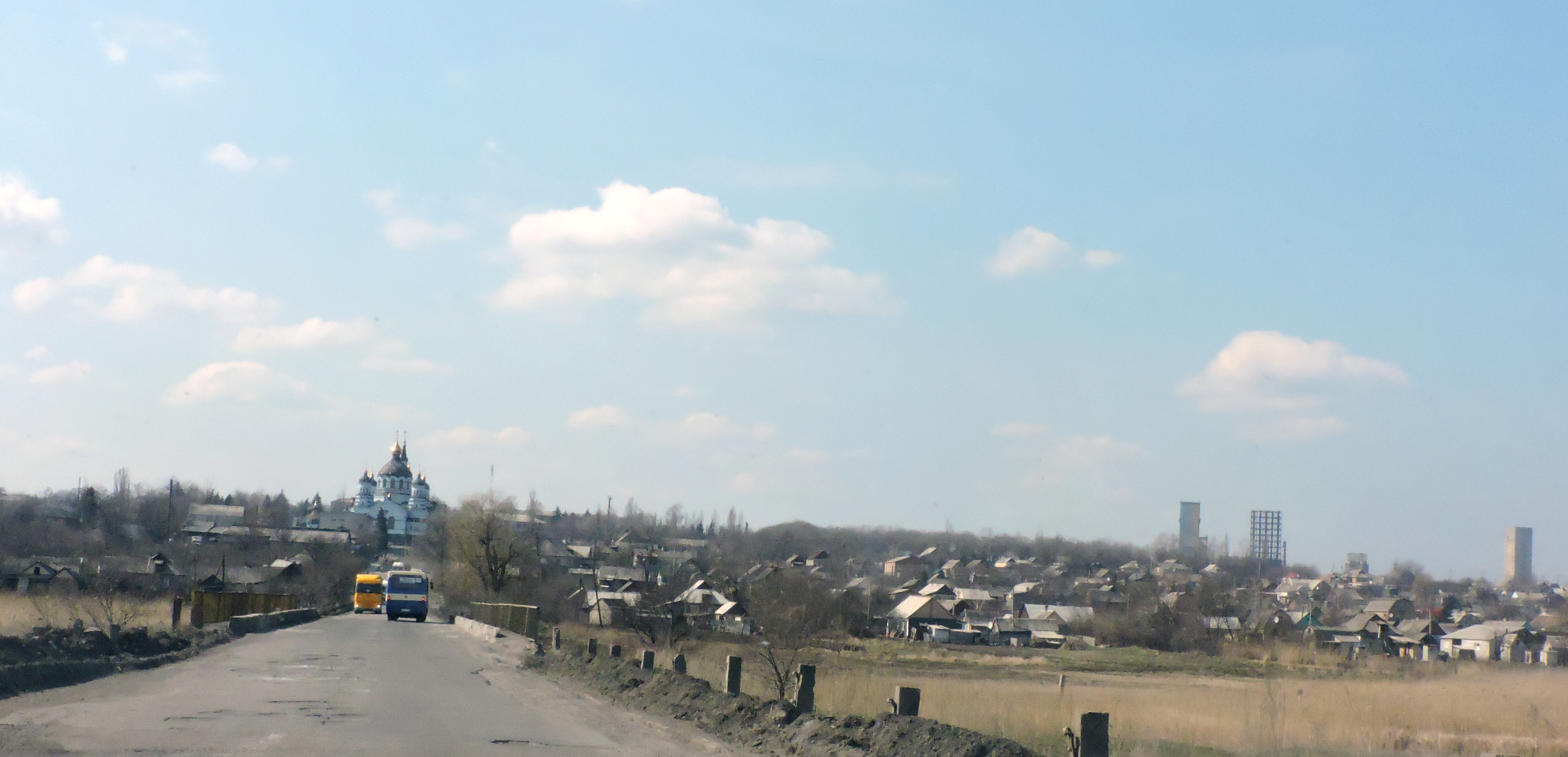 Вид на смт Новоекономічне з автодороги Т0504 з боку с. Улянівка Красноармійського району. На передньому плані – заплава та міст через р. Казенний Торець